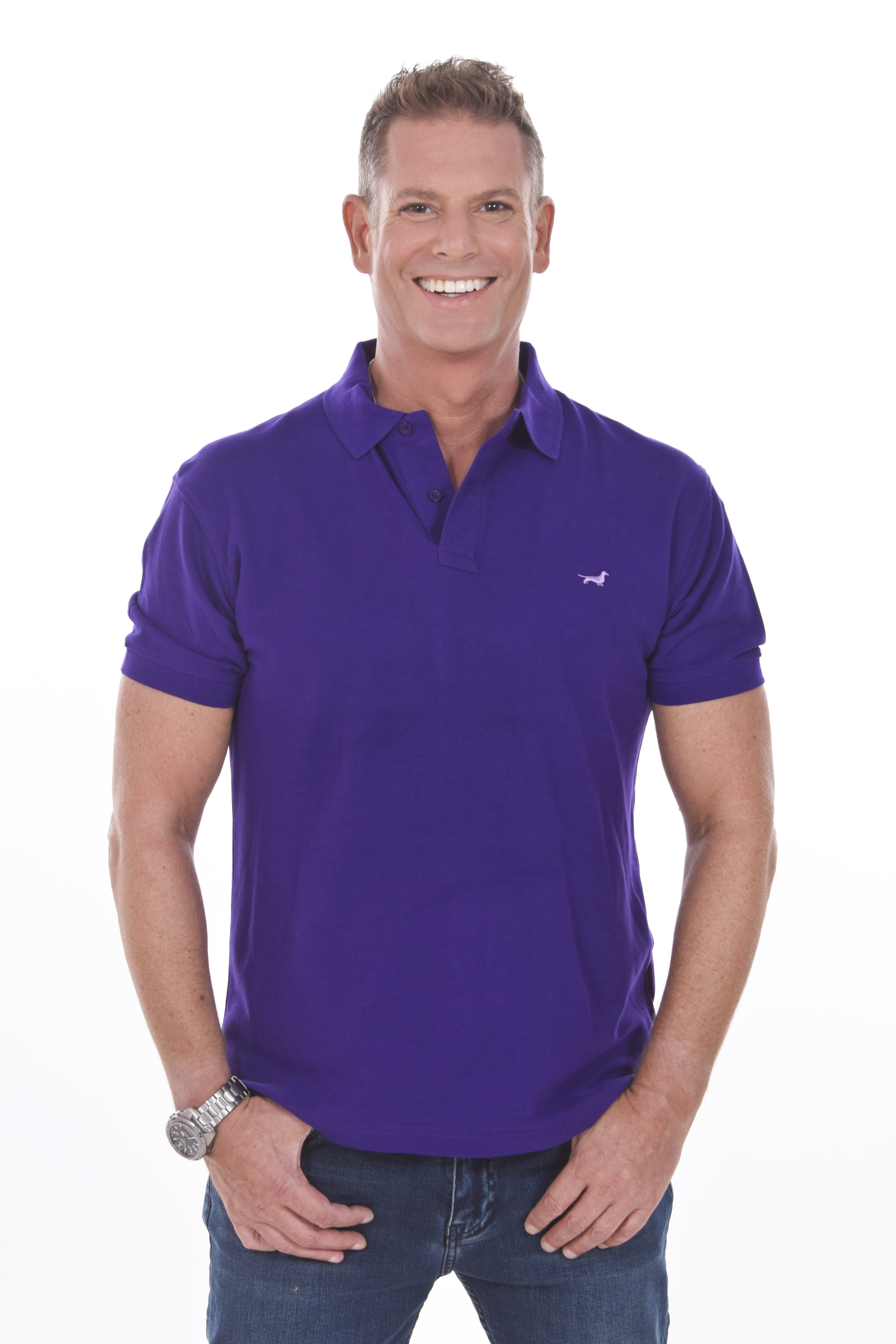 Offizielles Pressebild 2018